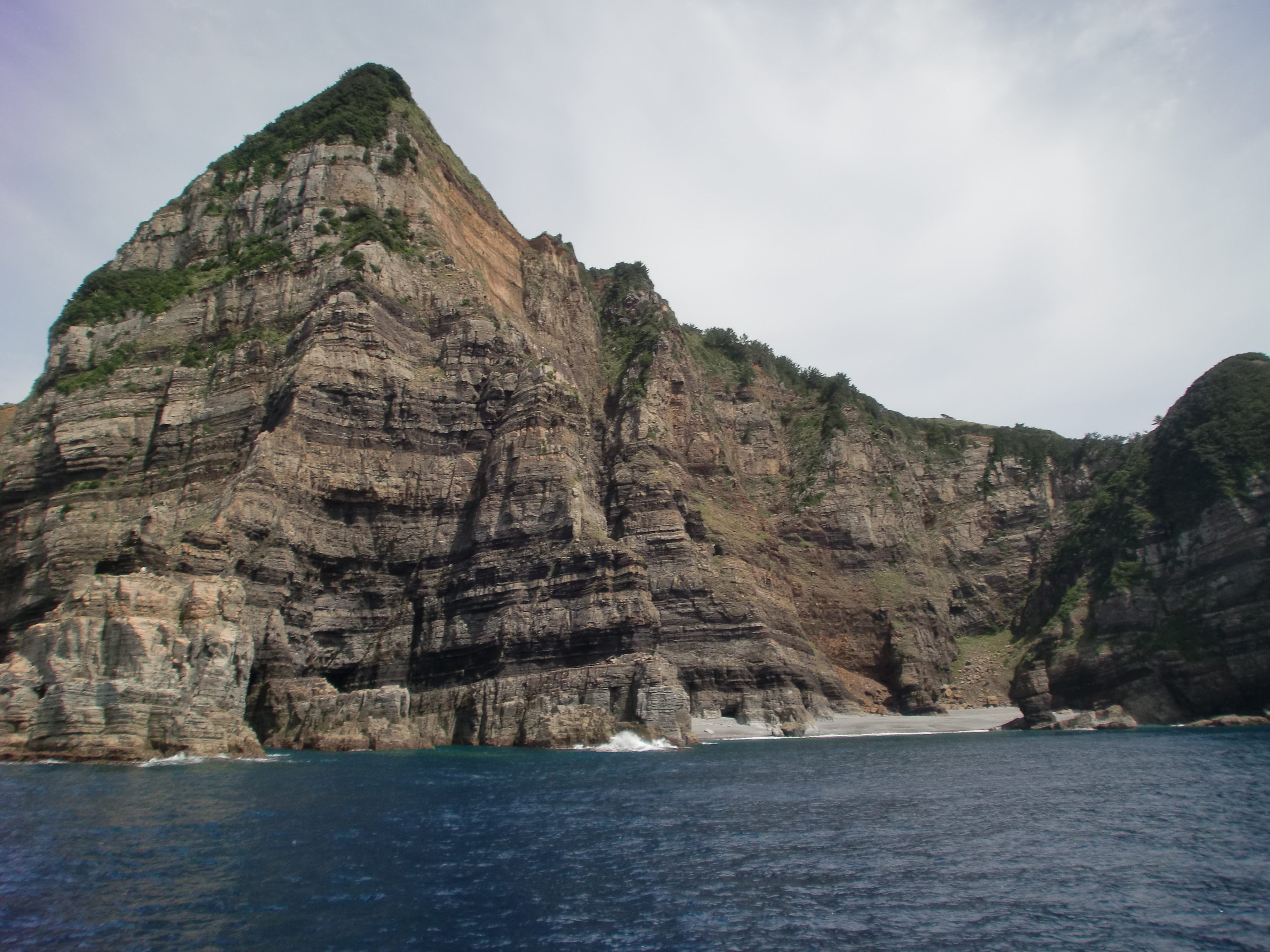 下甑島の鹿島断崖